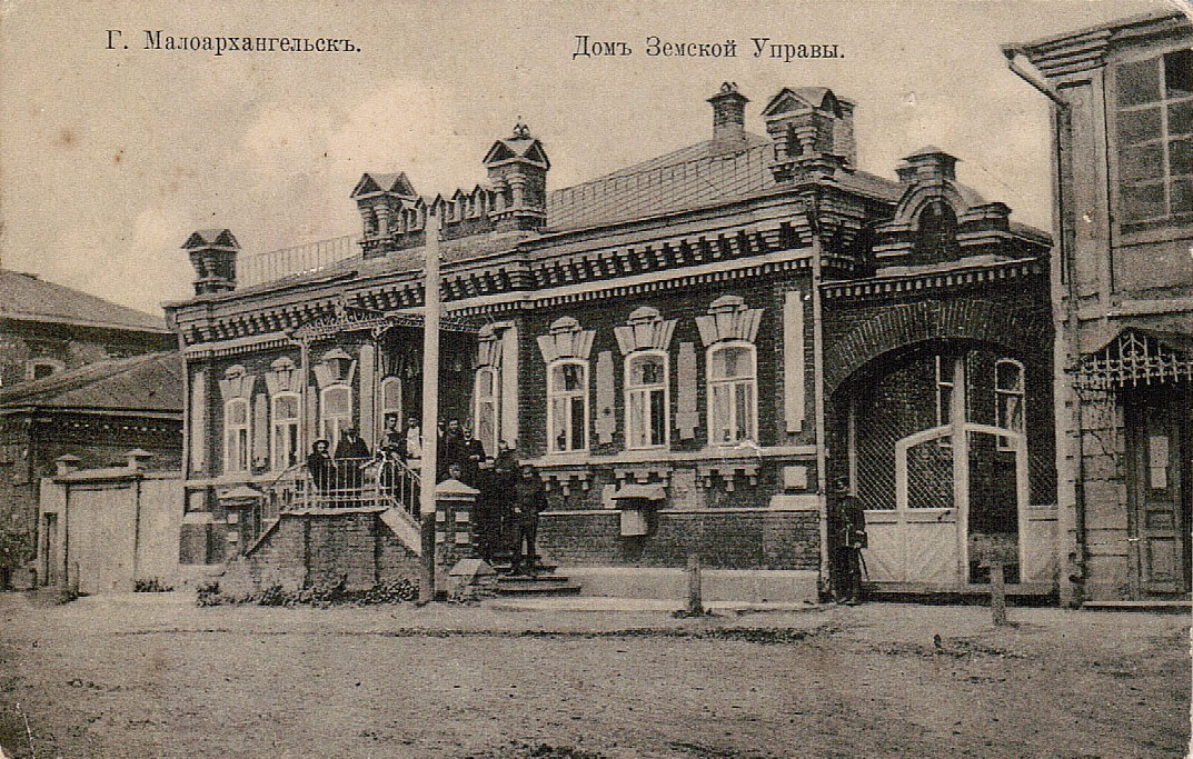 Малоархангельск. Дом земской управы